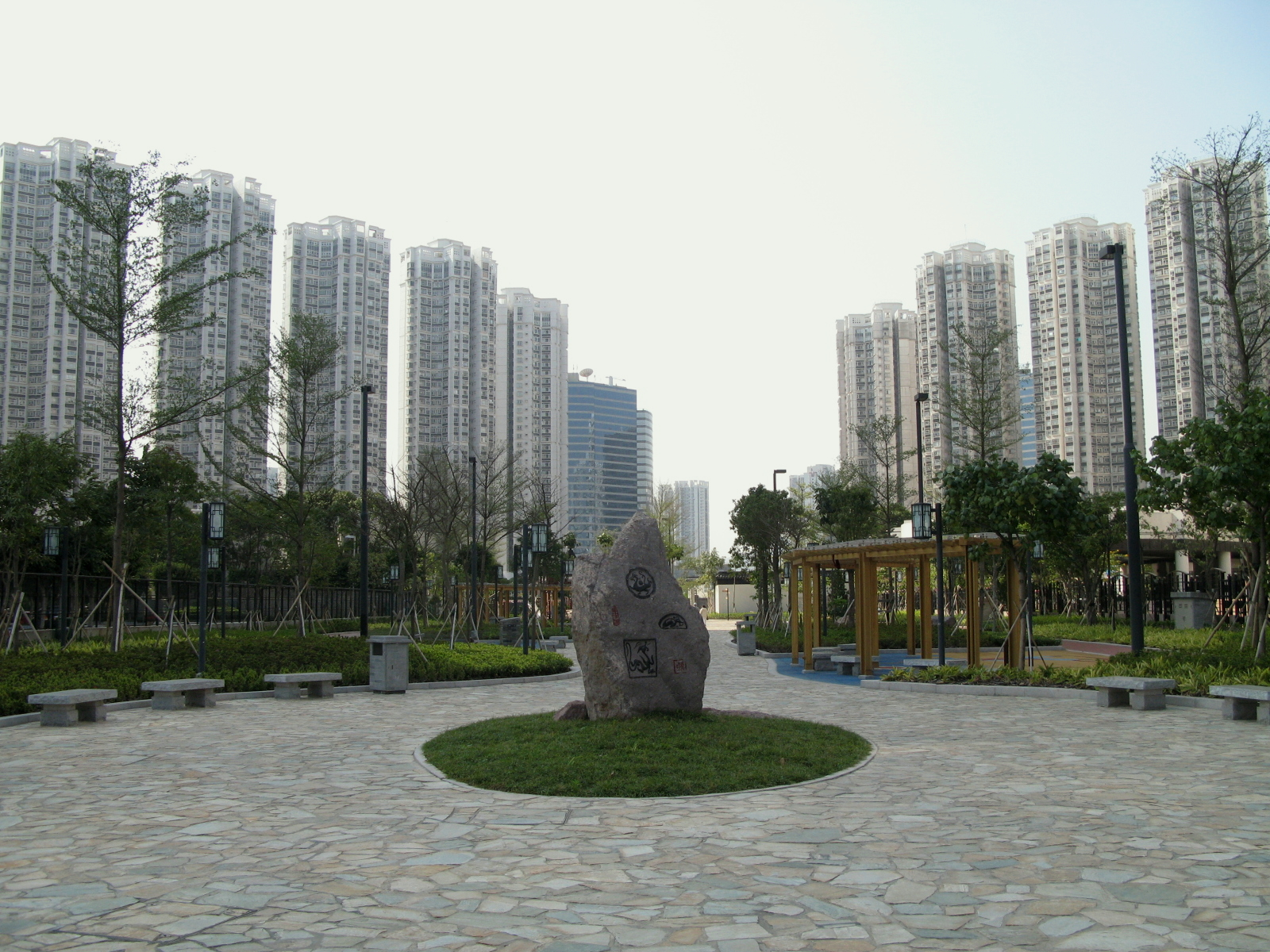 Fung Shui Lane in Dragon Park